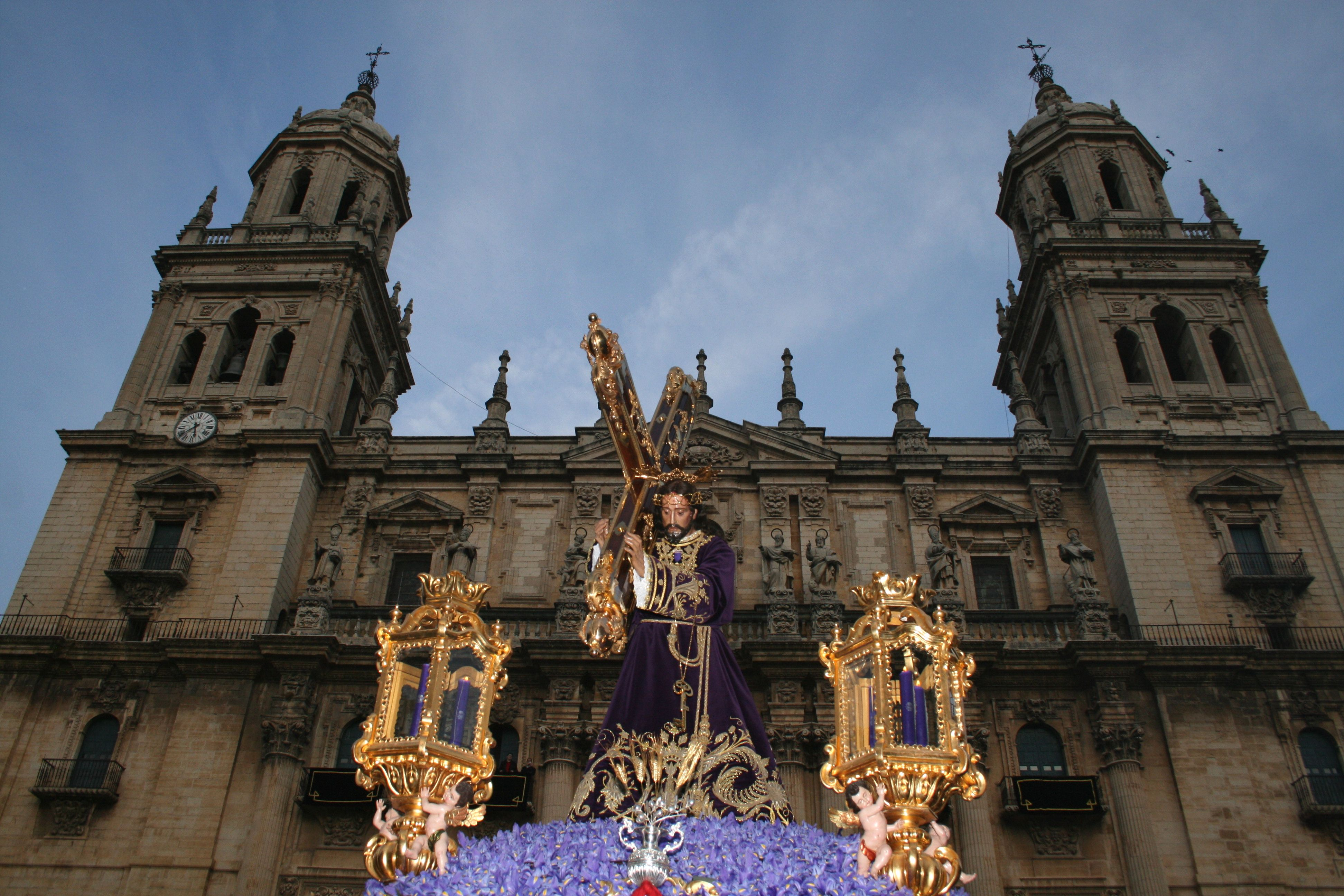 Страстната седмица